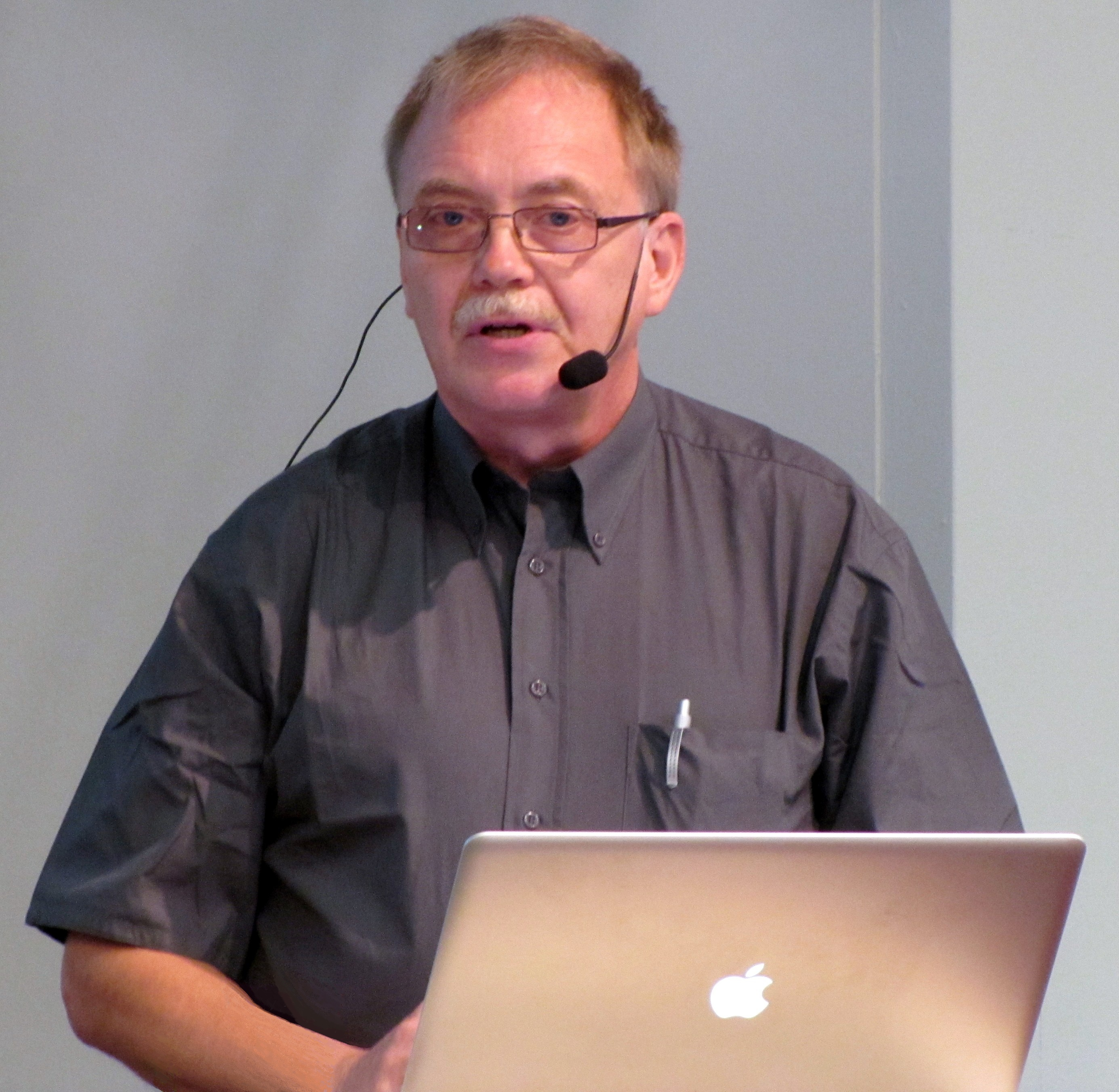 Lars Asplund, professor i datateknik vid Mälardalens högskola i Västerås.